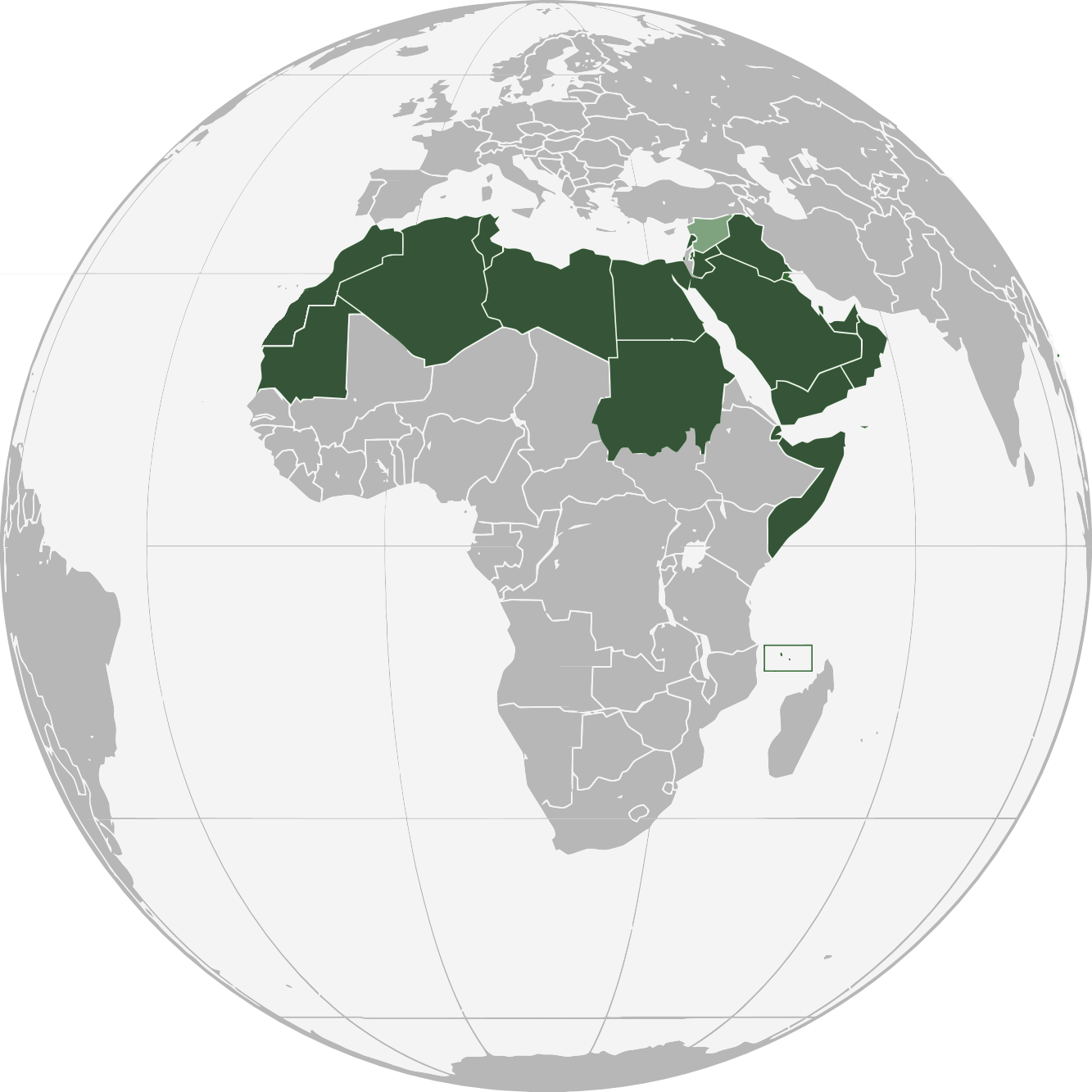 Pays de la ligue arabe